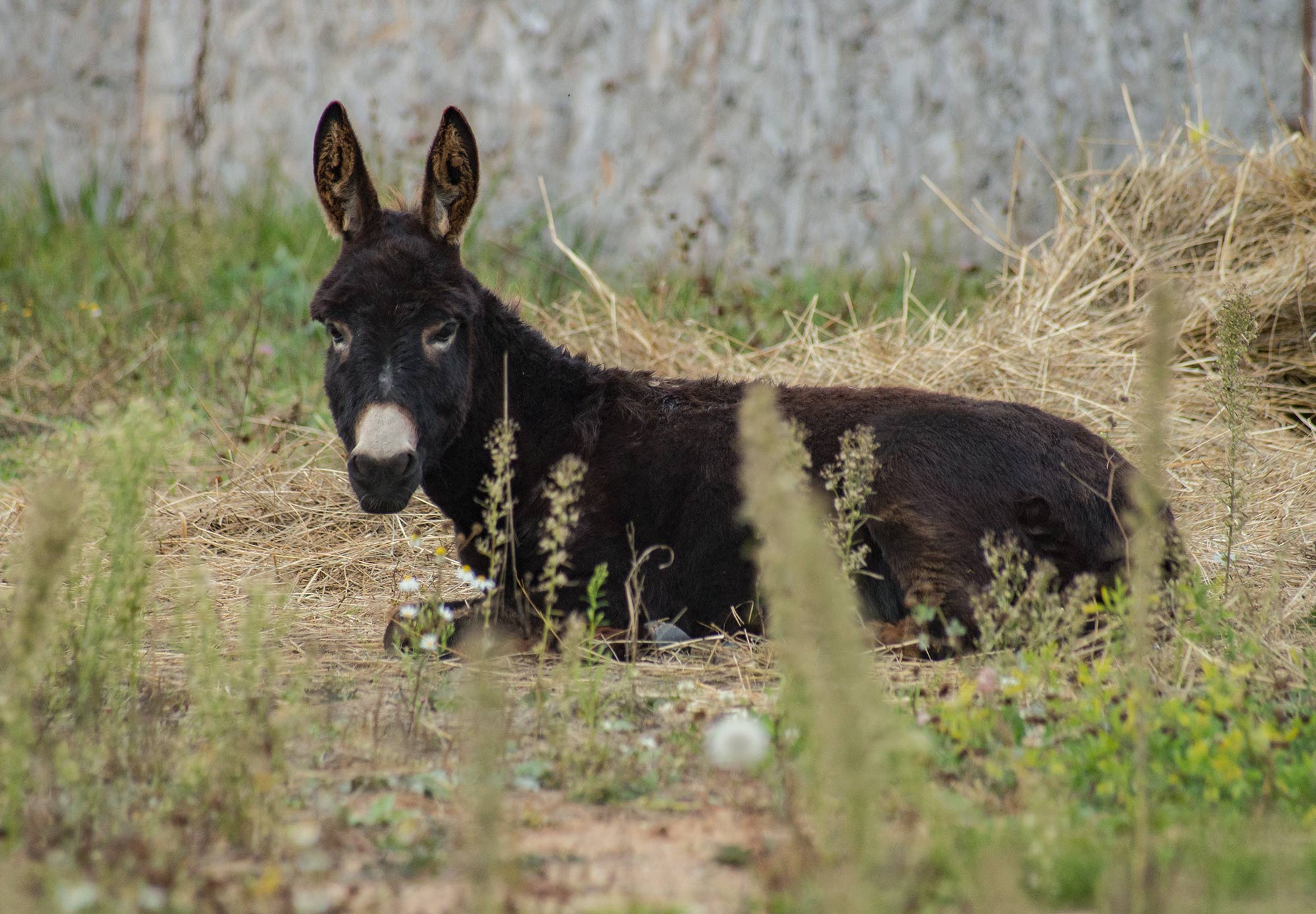 Осел домашний